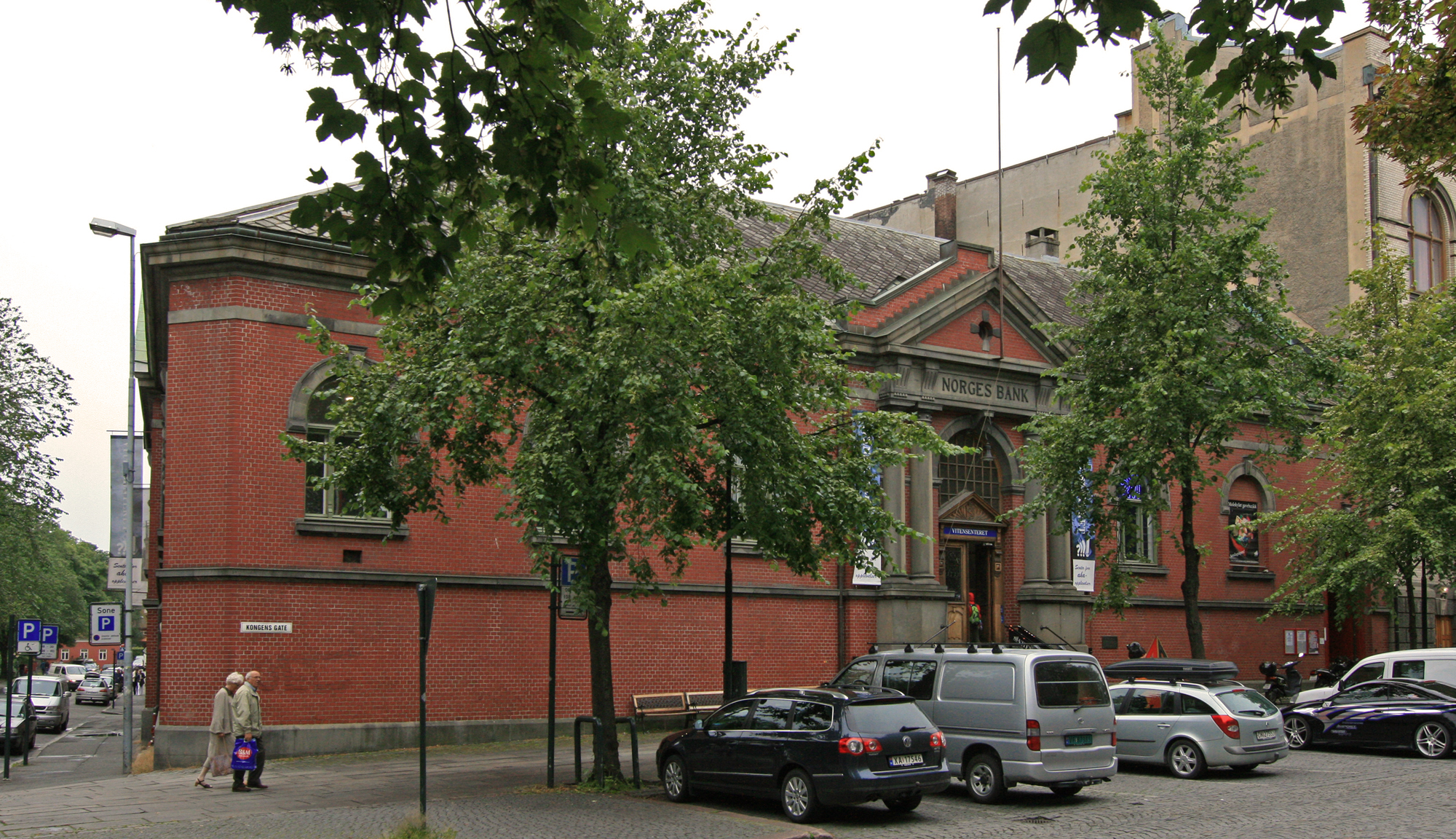 Vitensenteret, Kongens gate 1, Trondheim. Norges Banks første hovedkontor, bygd 1833; arkitekt J.C.Ræder. Ombygd 1897; arkitekter Johan Christensen og Lars Solberg.